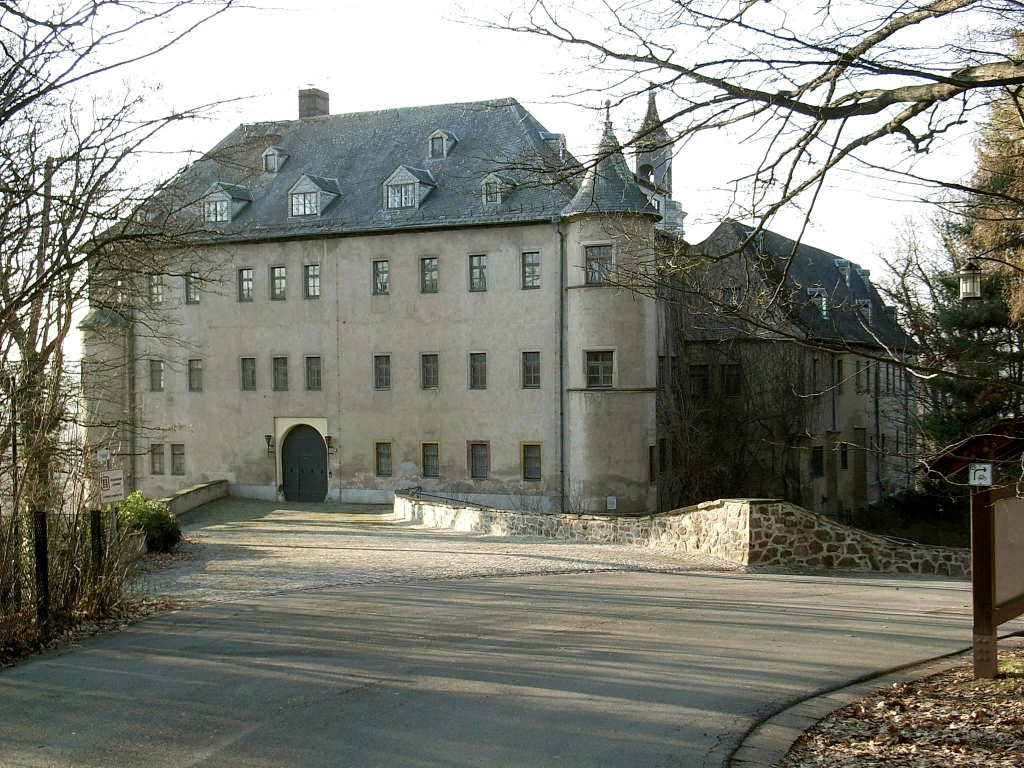 Eingang zum Schloss